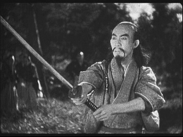 『國士無双』、1932年、スチル写真